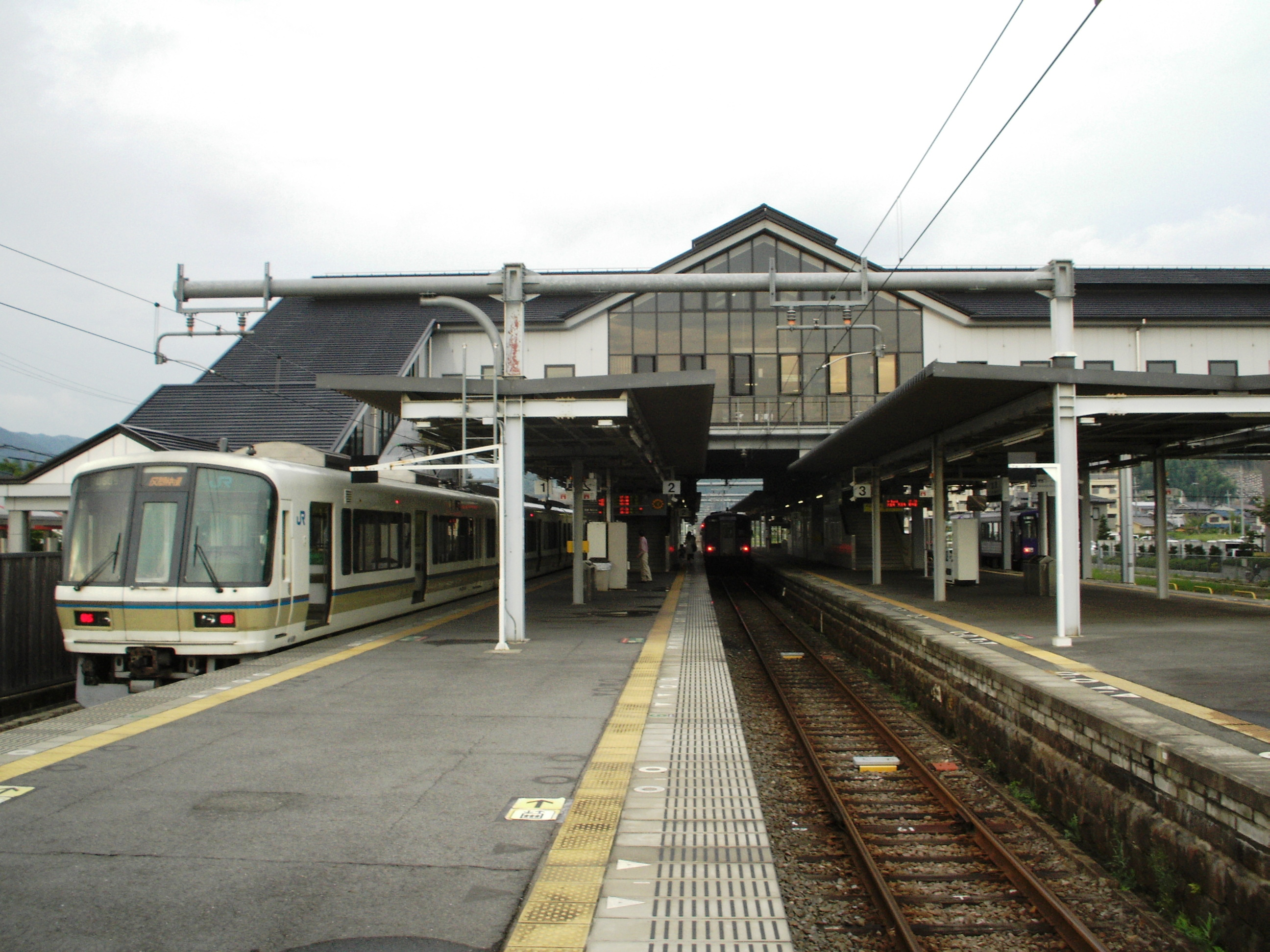 加茂駅プラットホーム